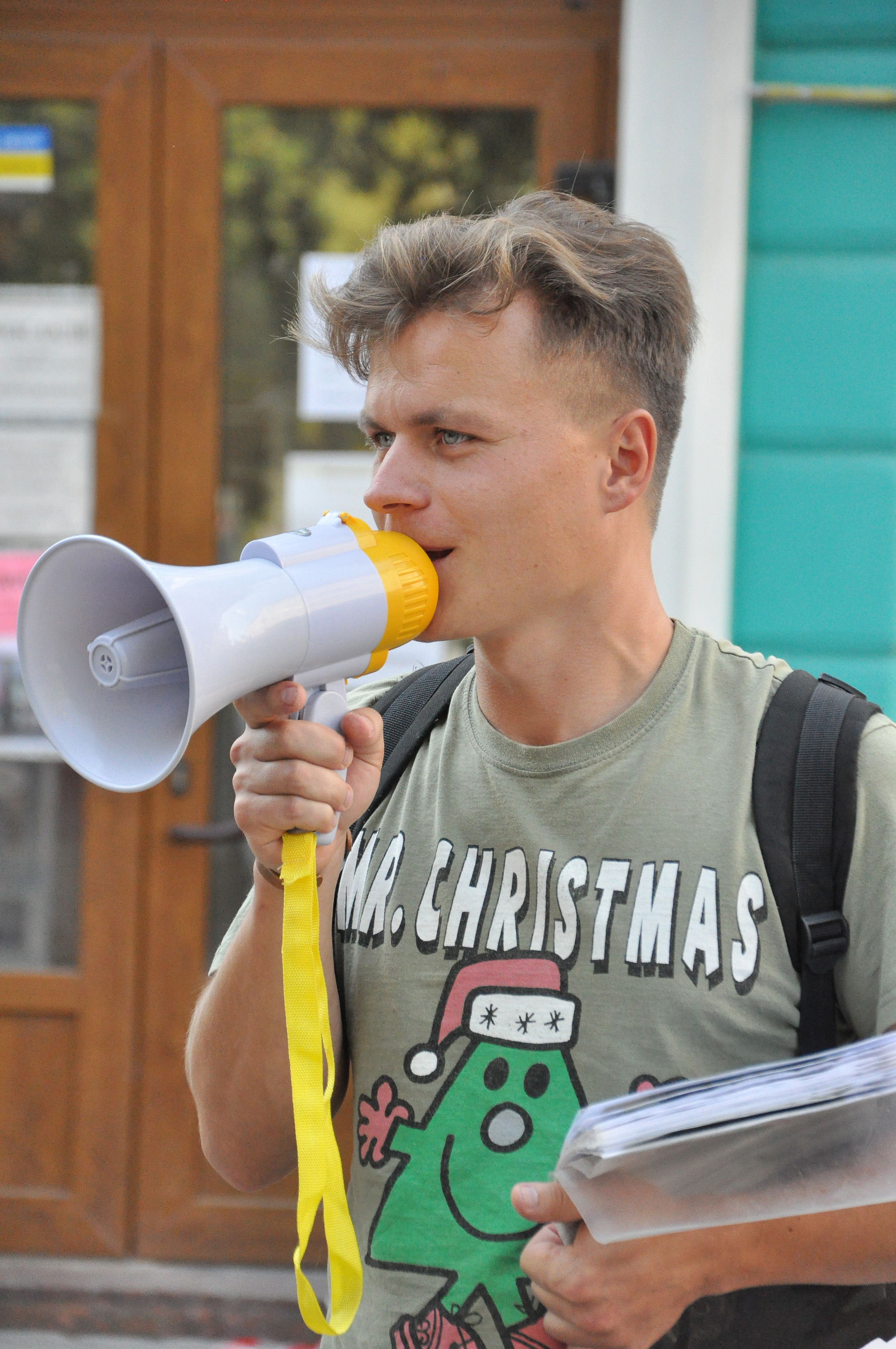 Український краєзнавець, екскурсовод, музикант Тарас Циклиняк.